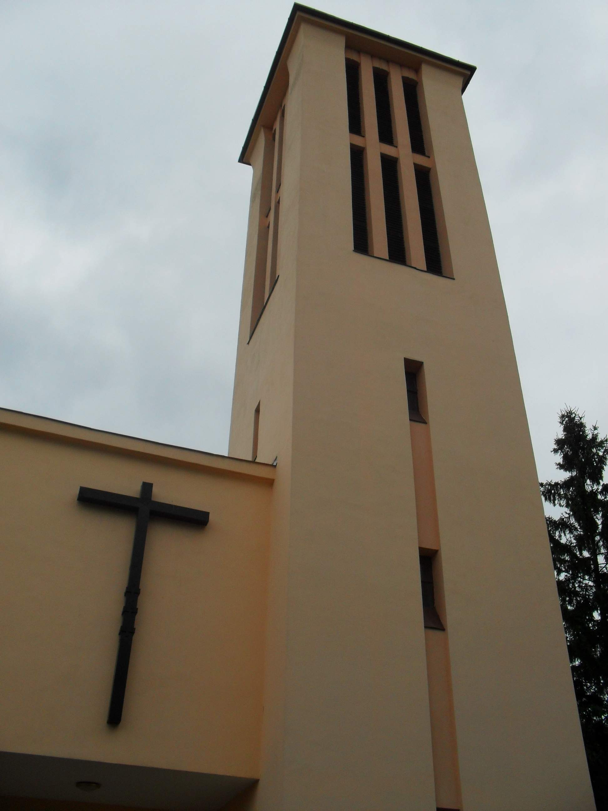 Tornalja - evangélikus templom